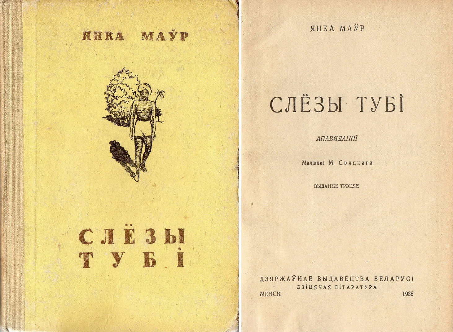 Вокладка і тытульны ліст кнігі "Слёзы Тубі", Янка Маўр, 1938 г., Менск, Дзіцячая літаратура. Наклад - 10 000 экз..